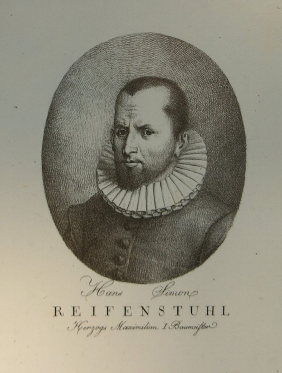 Infotafel im Salinenpark Traunstein (Ausschnitt)